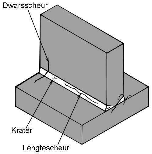 Lasscheuren